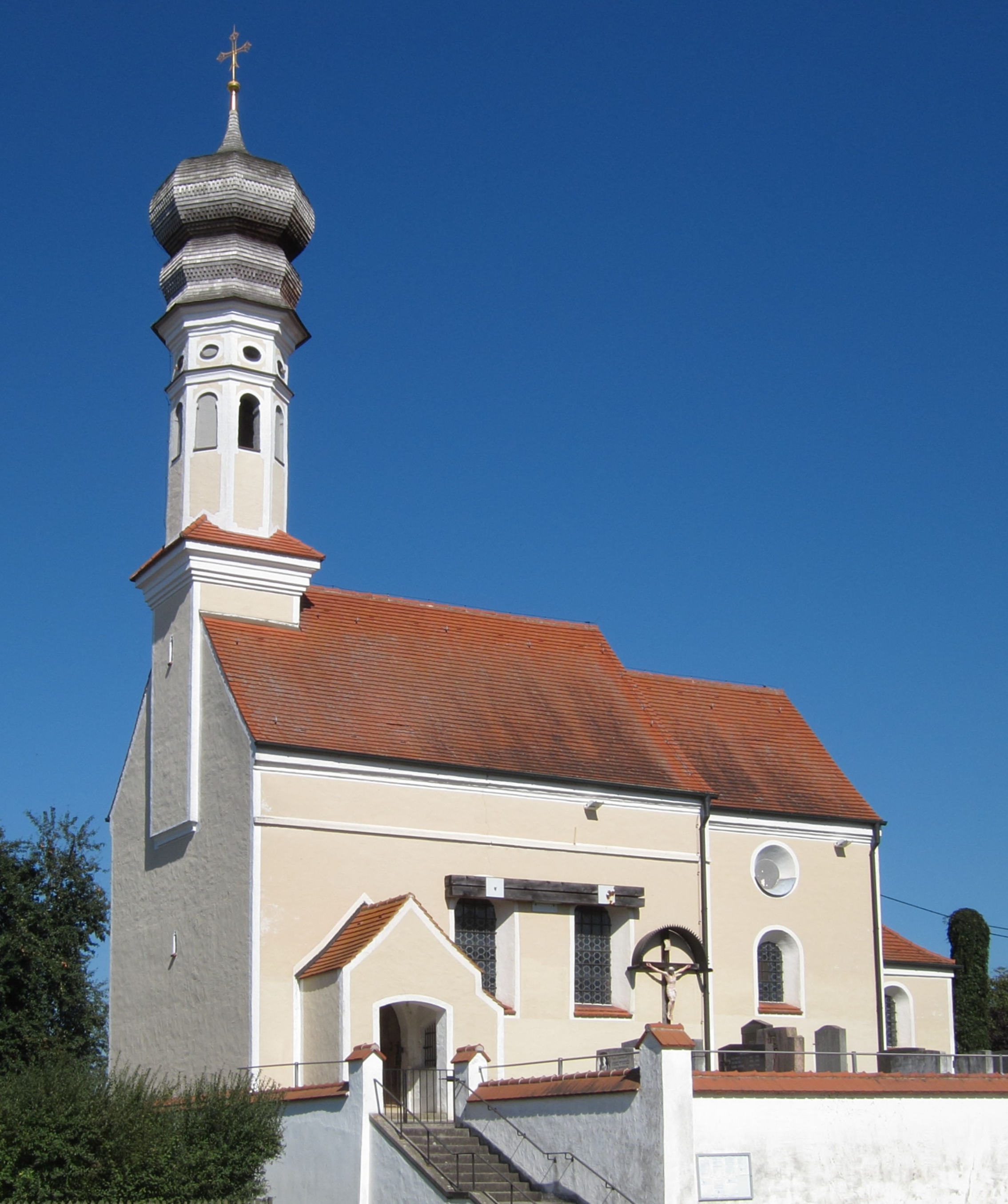 Kath. Filialkirche Hl. Kreuzauffindung, barocke Saalkirche mit eingezogenem geraden Chor und Zwiebelturm, von Hans Kogler, 1692; mit Ausstattung.